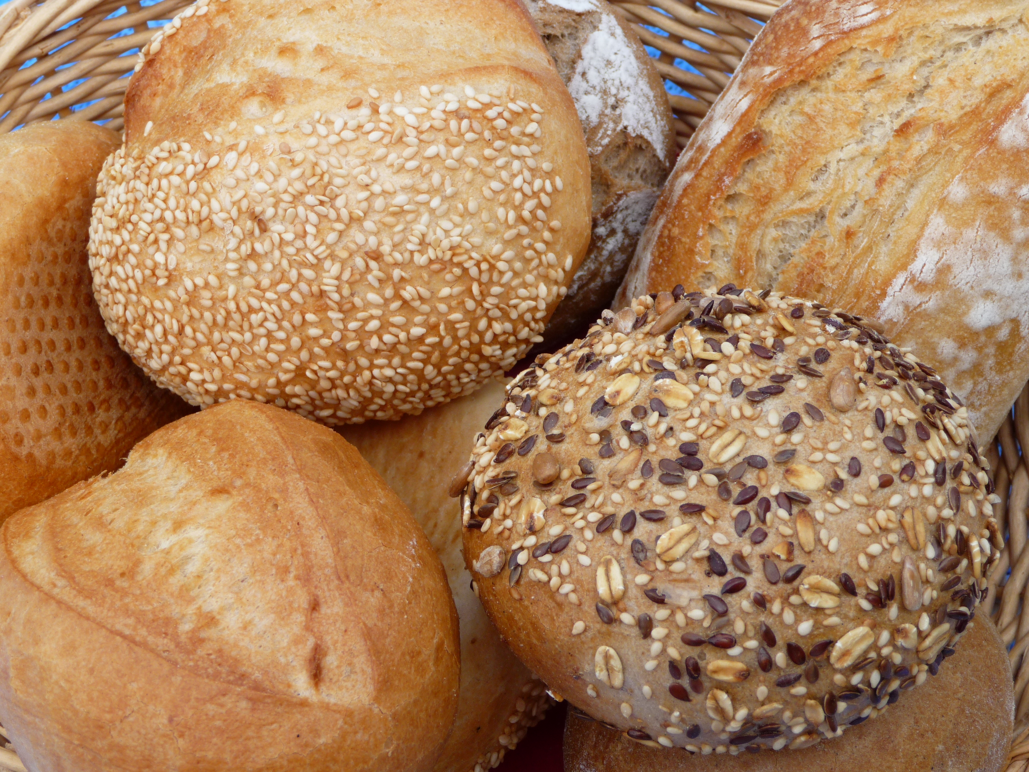 Frühstückskorb mit Sesambrötchen, Mehrkornbrötchen, Roggenbrötchen, Schrippe und Krusti